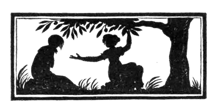 Luise Duttenhofer / Holzschnitt: Johann Wilhelm Gottlieb Pfnor: Die Versöhnung (1821), schwarzer Scherenschnitt, Eingangsvignette für das Gedicht „Die Versöhnung“ aus dem Gedichtband „Lautentöne“ von Christian Gottlob Vischer. Eduard Mörike kopierte den Scherenschnitt nach dem Original. Die Kopie sandte er am 25. Mai 1827 aus Köngen in einem Brief an seinen Freund Wilhelm Hartlaub (1804-1885): „Noch eine kleine Beilage ist die schwarze Gruppe die ich nach einer Silhouette der berühmten Madam Duttenhofer in Stuttg[art] gemacht habe, schnell aber getreu. Es ist ein sehr lieblicher Gedanke, soll die Versöhnung zweier Kinder allegorisiren, wovon das Eine, das beleidigt hat, sich vor Schaam und Reue nicht will trösten lassen. Der Baum scheint e[ine] Olive zu sein. Das Ganze, bey so großer Einfachheit – wie alle dergleichen Compositionen dieser äußerst geistreichen Frau – bewundernswürdig!“ (Fiege, Gertrud: Die Scherenschneiderin Luise Duttenhofer, Marbach 1990, Seite 27). Der Holzschnitt zeigt den Der Holzschnitt zeigt den Originalschnitt seitenverkehrt und an den Seiten verkürzt.